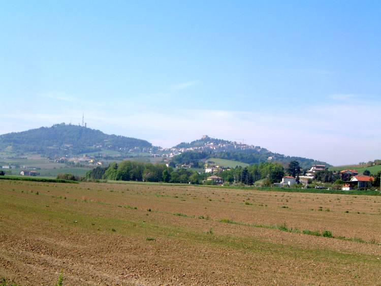 Je suis l'auteur de cette photo prise en avril 2007